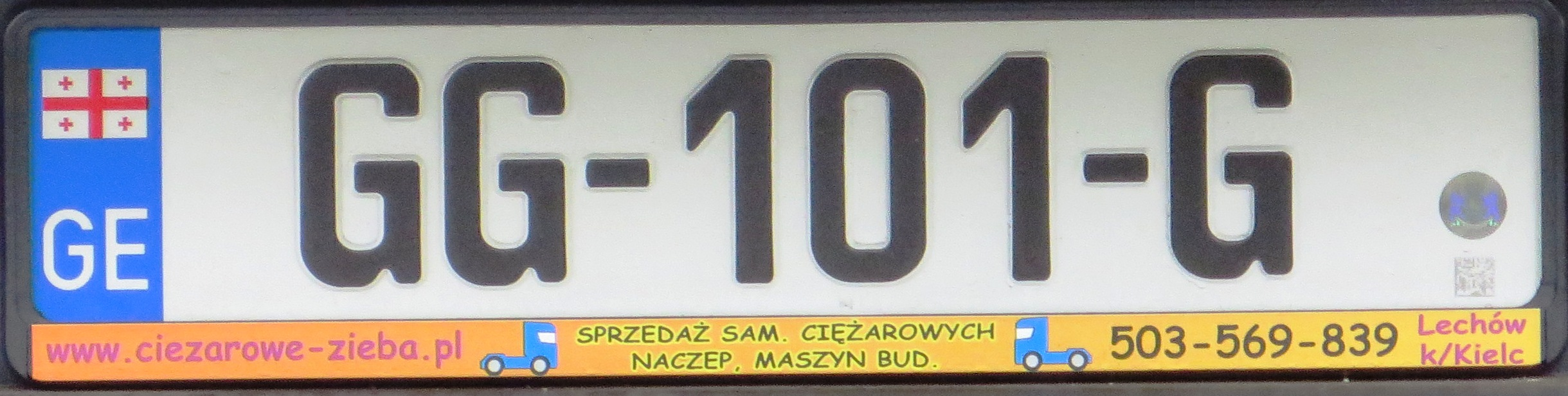 Kentekenplaat uit Georgië